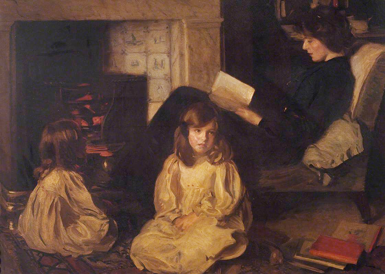 Harrington Mann (1864-1937)_0048